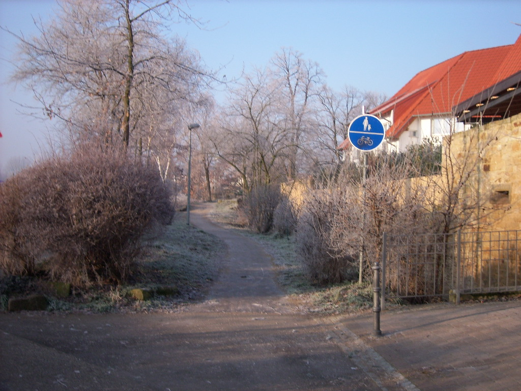 Erpolzheim